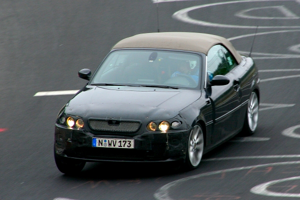 BMW 1er Cabrio, fotografiert auf der Nordschleife des Nürburgrings im Sommer 2006